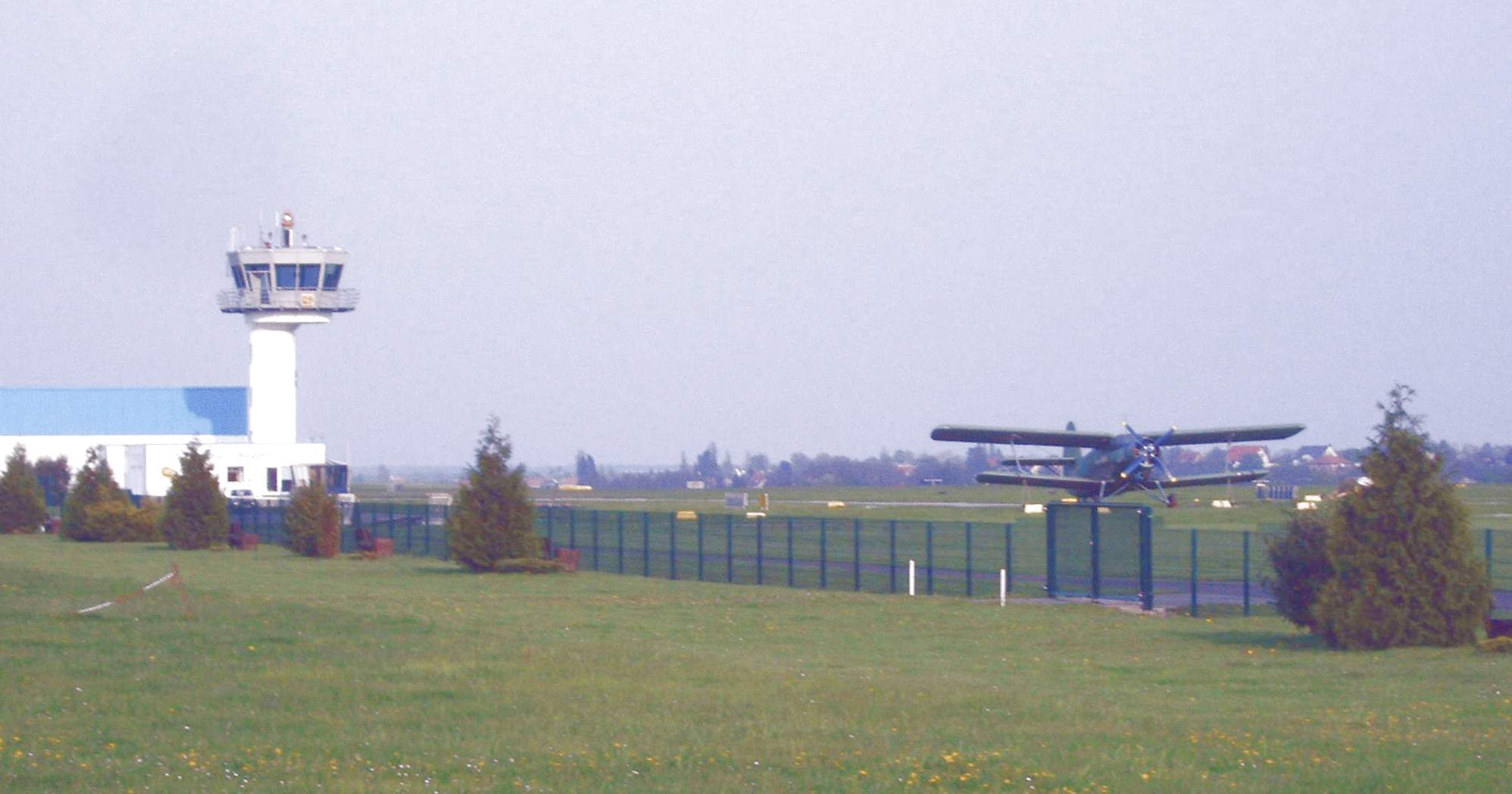 Flugplatz Magdeburg, Rollfeld und neuer Tower Bild aufgenommen am 7.5.2006